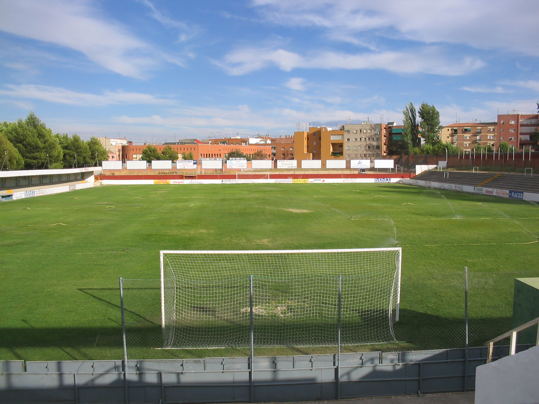 Una de las últimas imágenes del Román Valero con césped natural año 2005